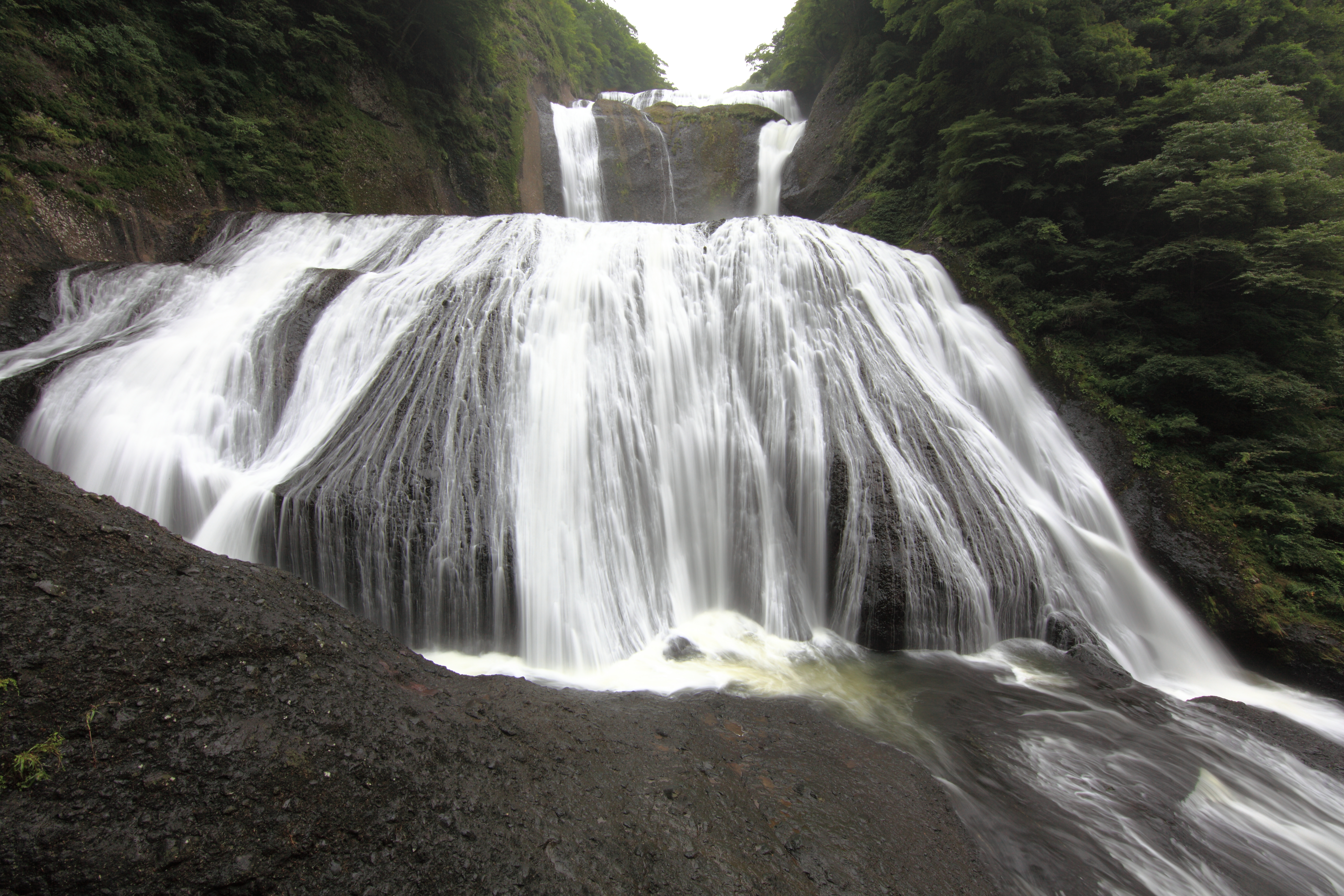 Fukuroda Falls, Daigo-machi(town) Kuji-gun(County) Ibaraki-ken(Prefecture), Japan ja:%e8%a2%8b%e7”%b0%e3 %ae%e6%bb%9d|茨城県久慈郡(いばらきけんくじぐん) 大子町(だいごまち) 袋田の滝(ふくろだのたき)